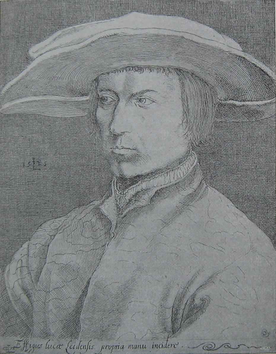 Lucas van Leyden, kopparstick, 1525? Version of the Durer portrait